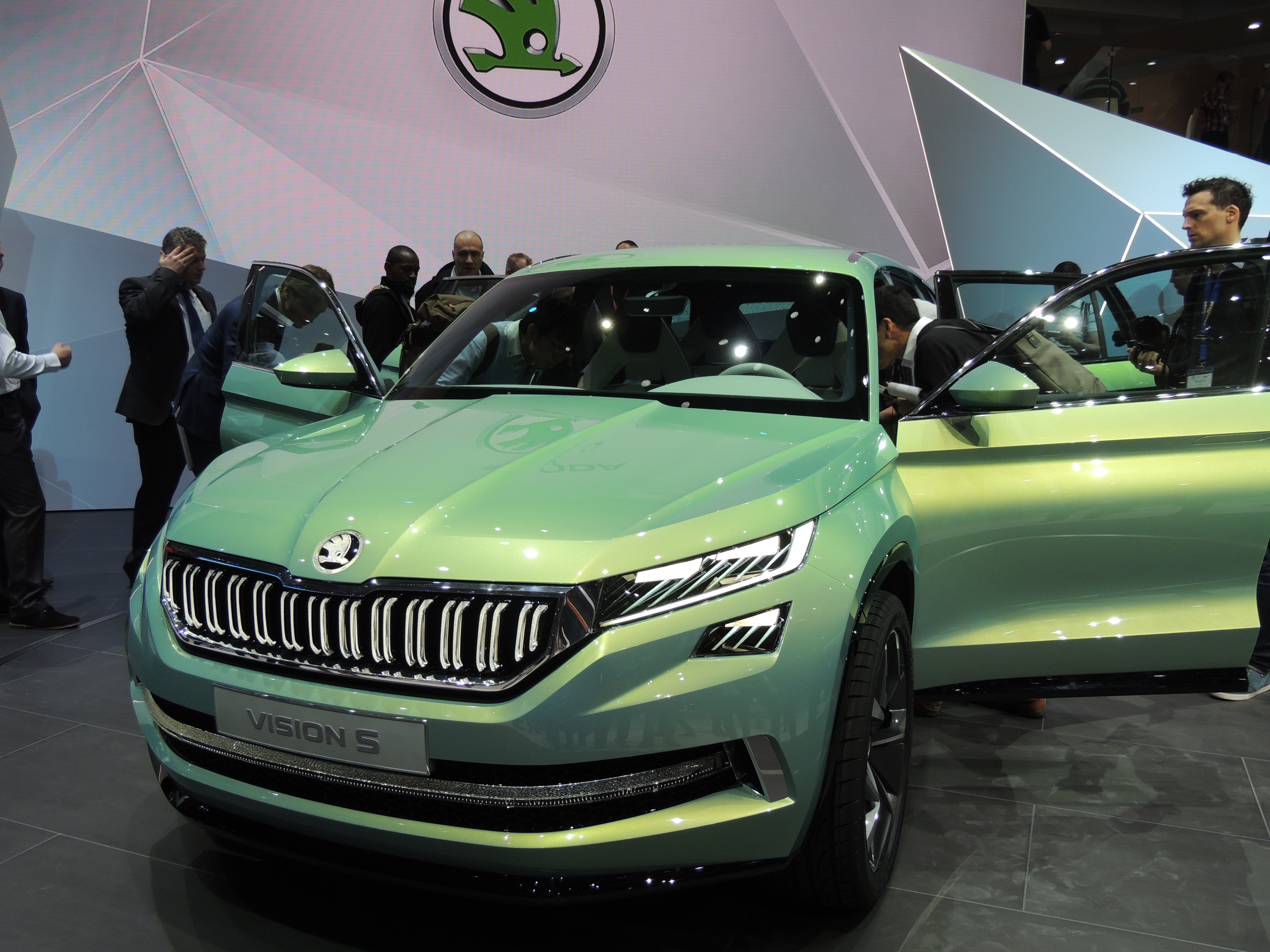 Škoda Concept SUV, salon de Genève 2016